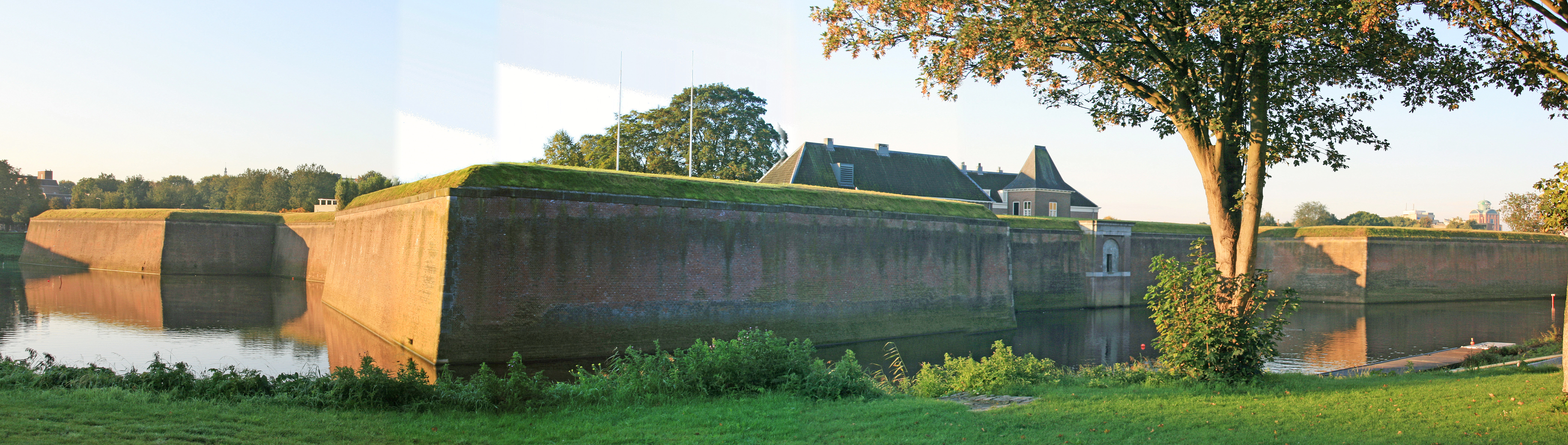 's-Hertogenbosch - Citadellaan - Vestingwerken